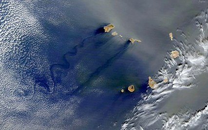 Surgencia de aguas profundas en la costa suroeste de las Islas de Cabo Verde en aguas de la Corriente de las Canarias